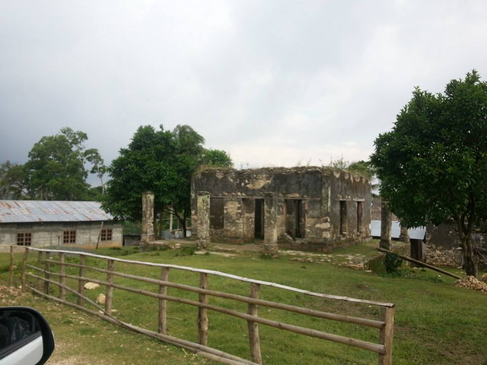 Fonte de Agua em Dato Rua,Fohorem